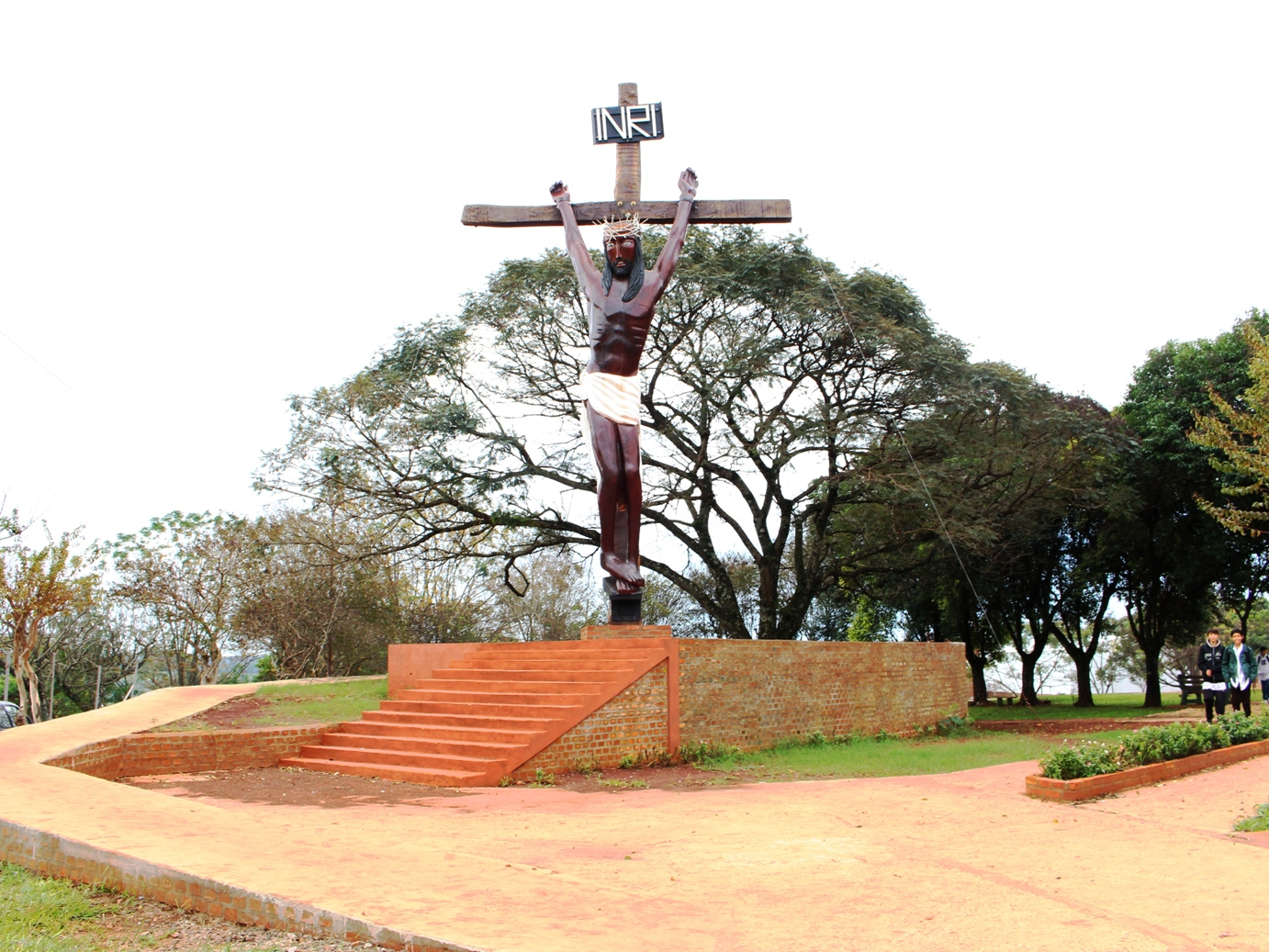 Imagen del "Cristo de la Hermandad", ubicado en la ciudad de Jardín América, Provincia de Misiones, Argentina.